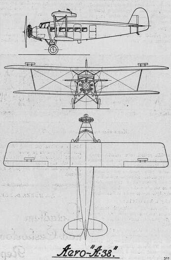 Aero A-38 (skica)